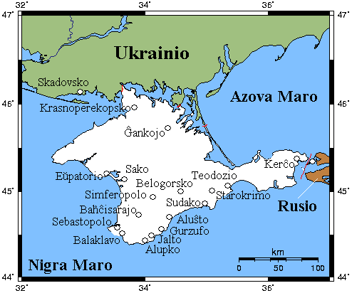 Simpla Esperant-lingva mapo de Krimeo Kategorio:Krimeo